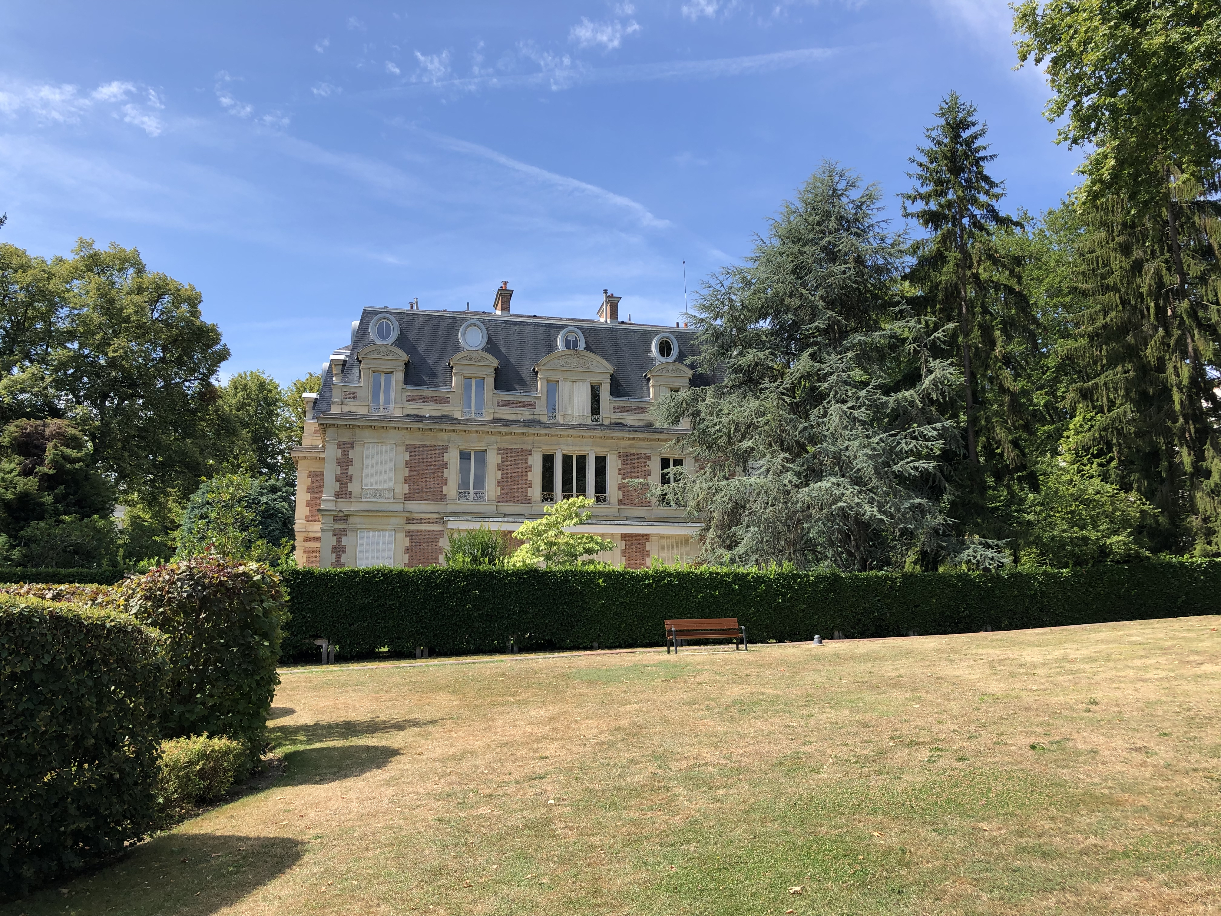 Château des Sources à Louveciennes (78) vu du côté du parc de la résidence Dauphine